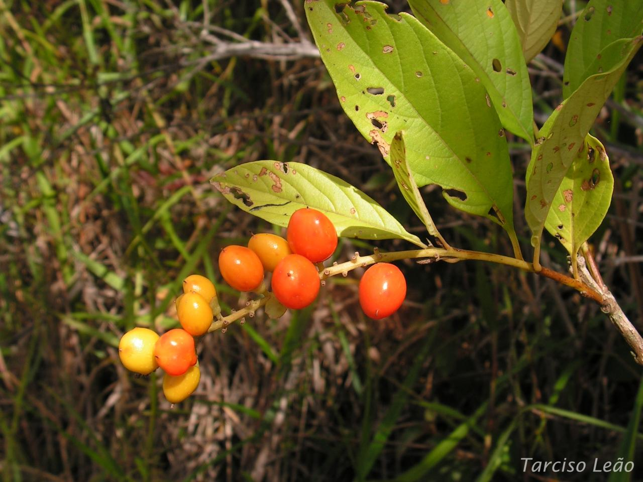 Verbenaceae – Citharexylum myrianthum Cham. – árvore pioneira – RPPN Pedra D'Anta, Serra do Urubu – Lagoa dos Gatos – Pernambuco – Brasil.